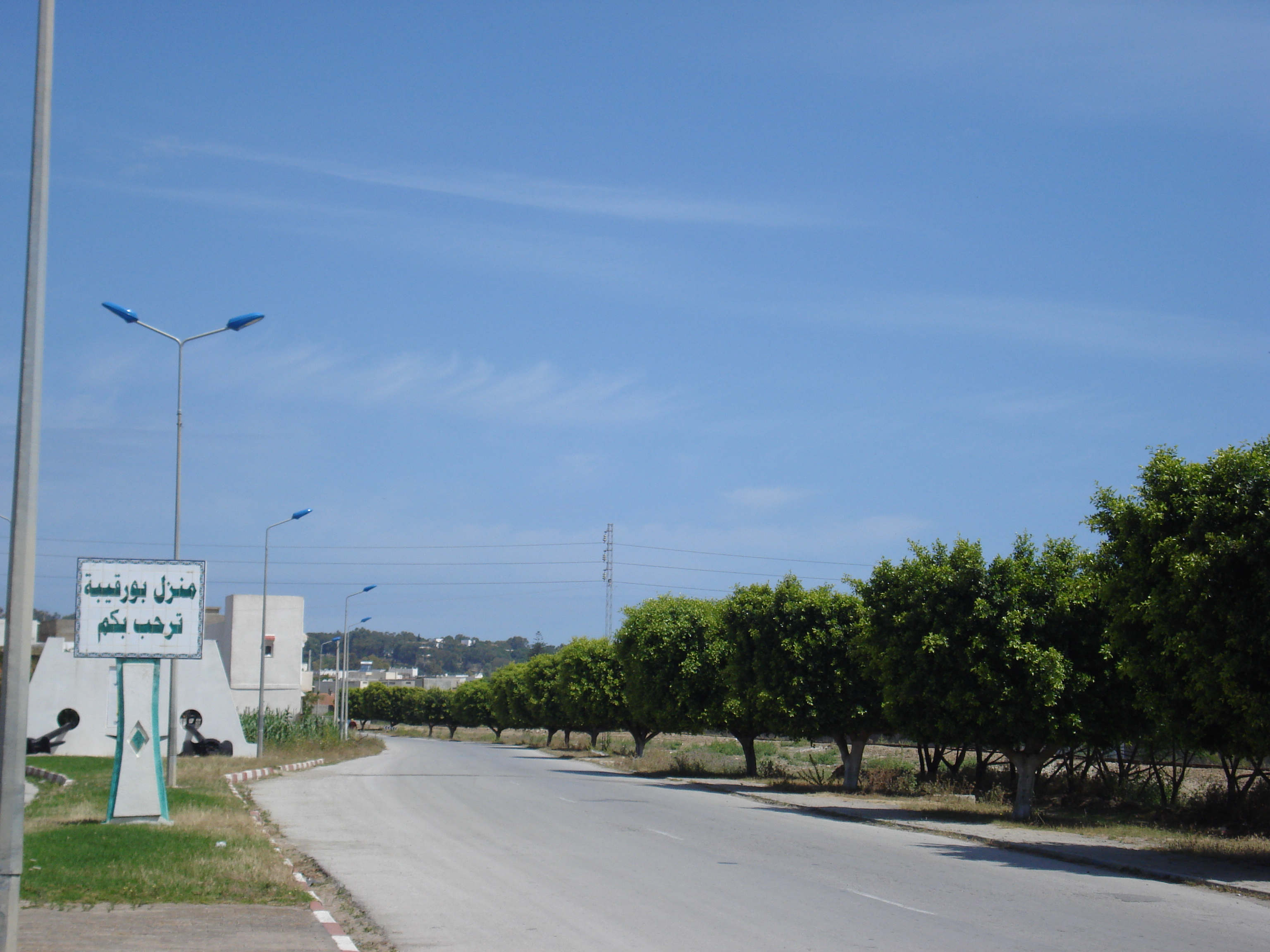 Entrée de Menzel Bourguiba, Tunisie